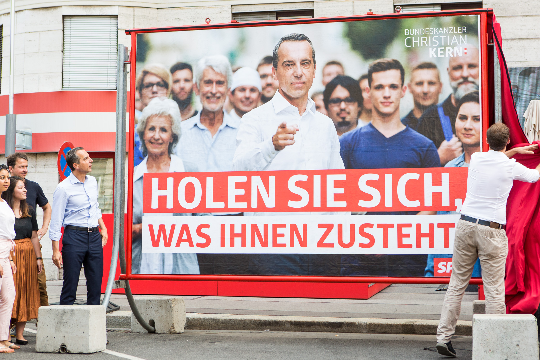 Präsentation Plakatsujets "Holen Sie sich, was Ihnen zusteht" © SPÖ / Astrid Knie